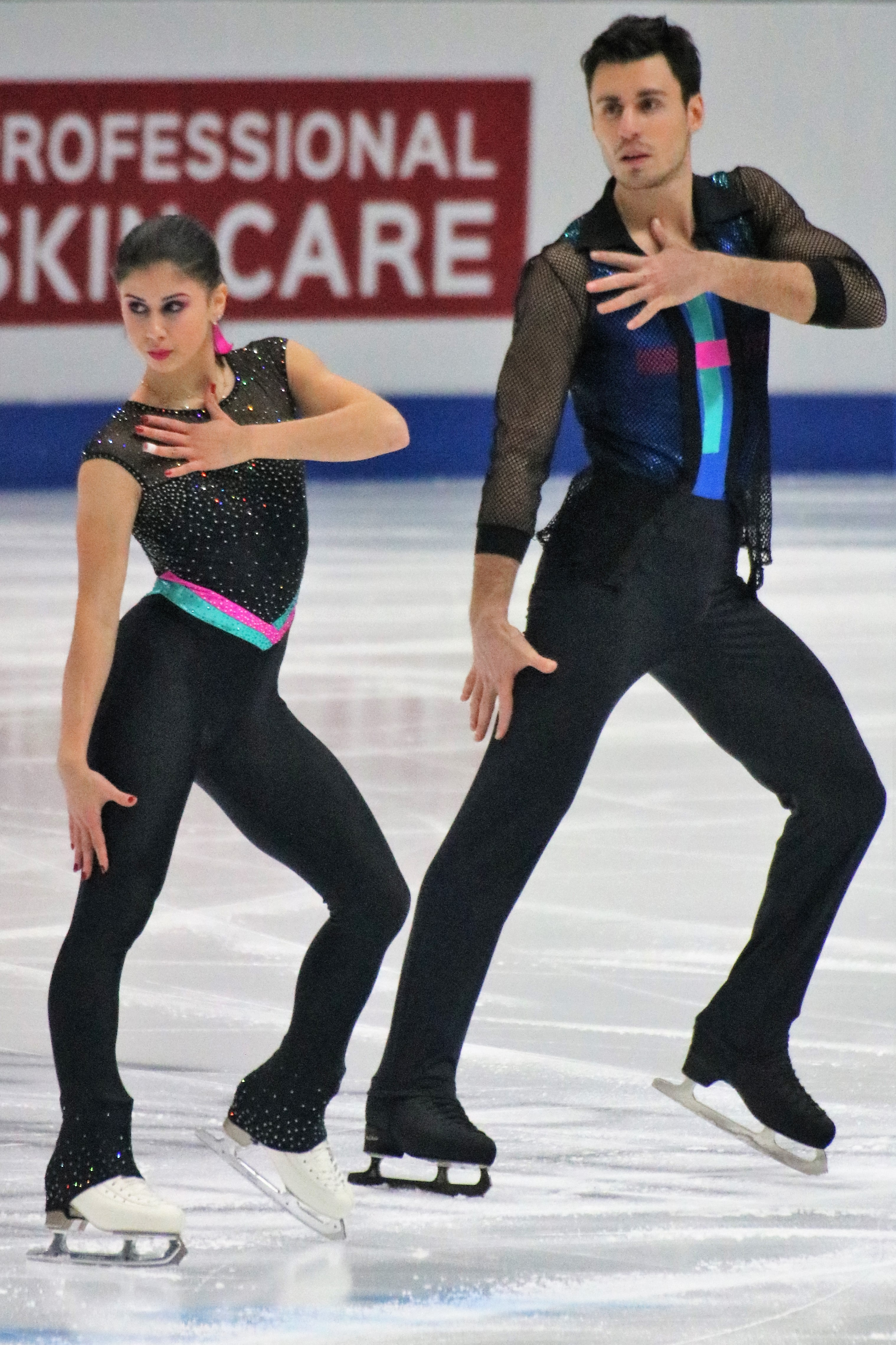 Ребекка Гиларди и Филиппо Амброзини (Италия) на чемпионате Европы по фигурному катанию 2020